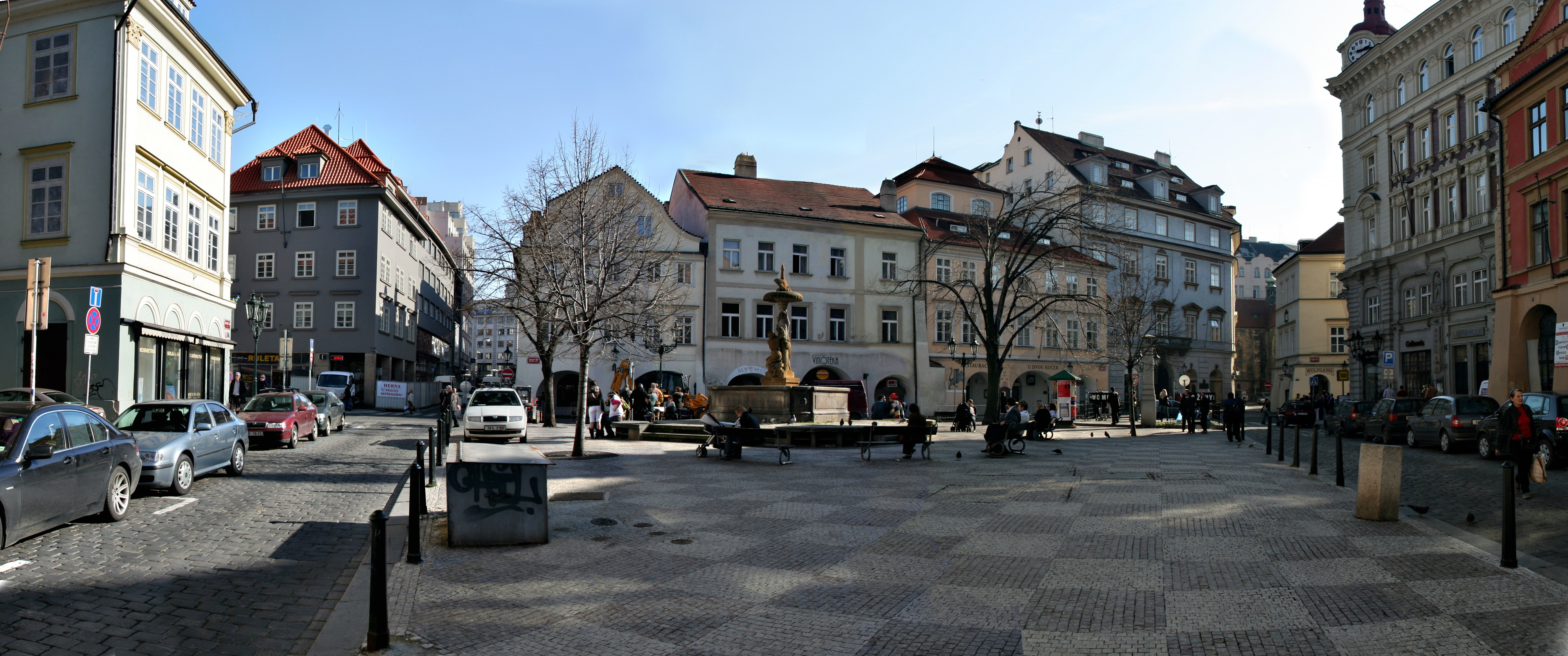 Uhelný trh